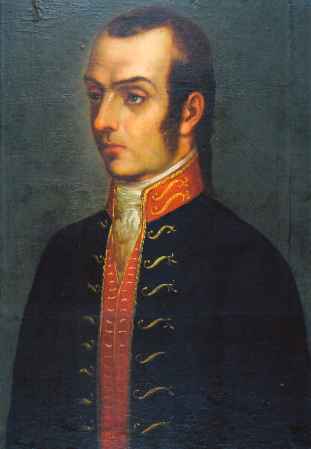 Francisco Antonio de Zela y Arizaga (1768-1819) revolucionario peruano de la guerra de la Independencia. Encabezó la revolución de Tacna de 1811.